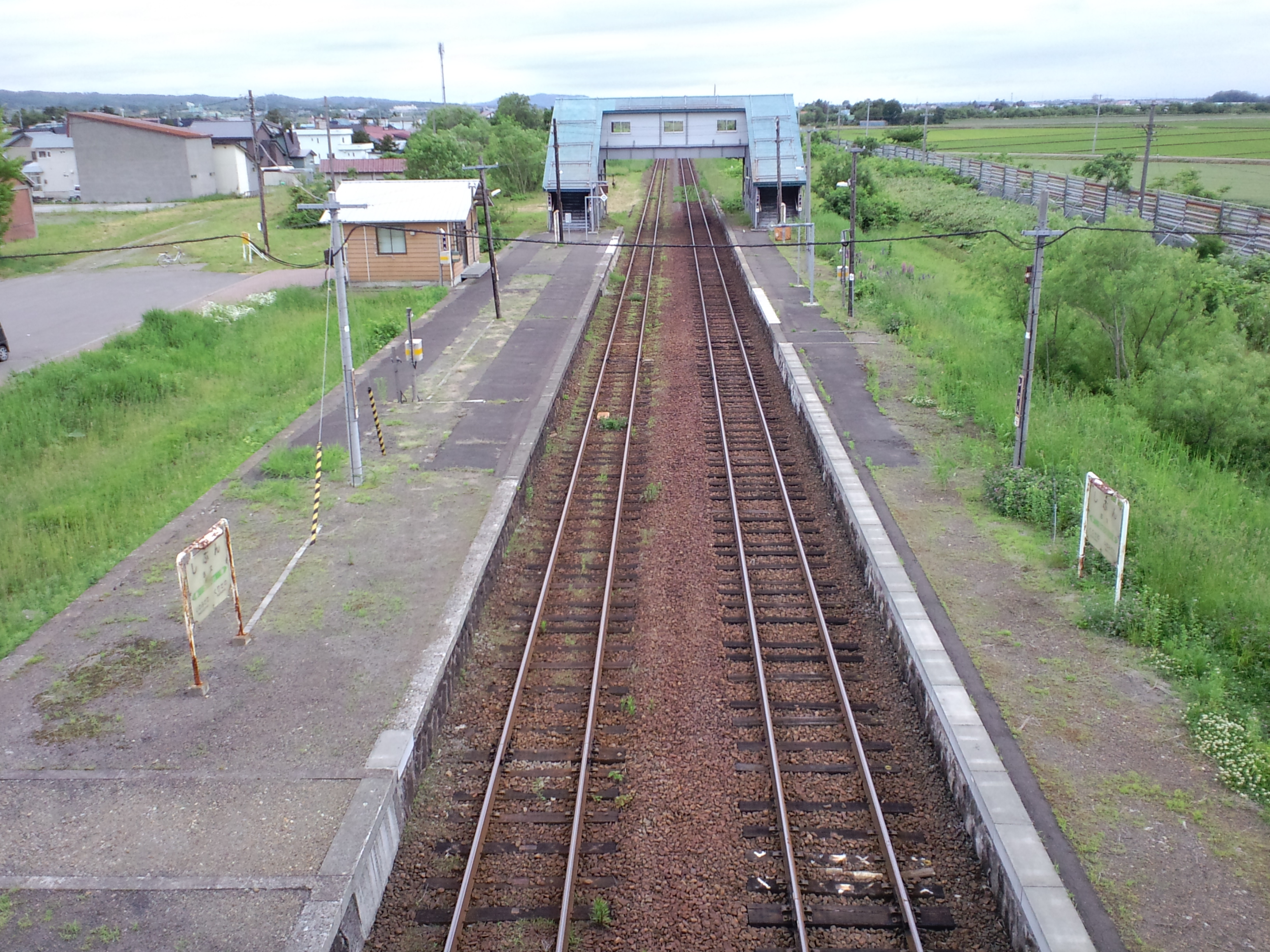 志文駅構内